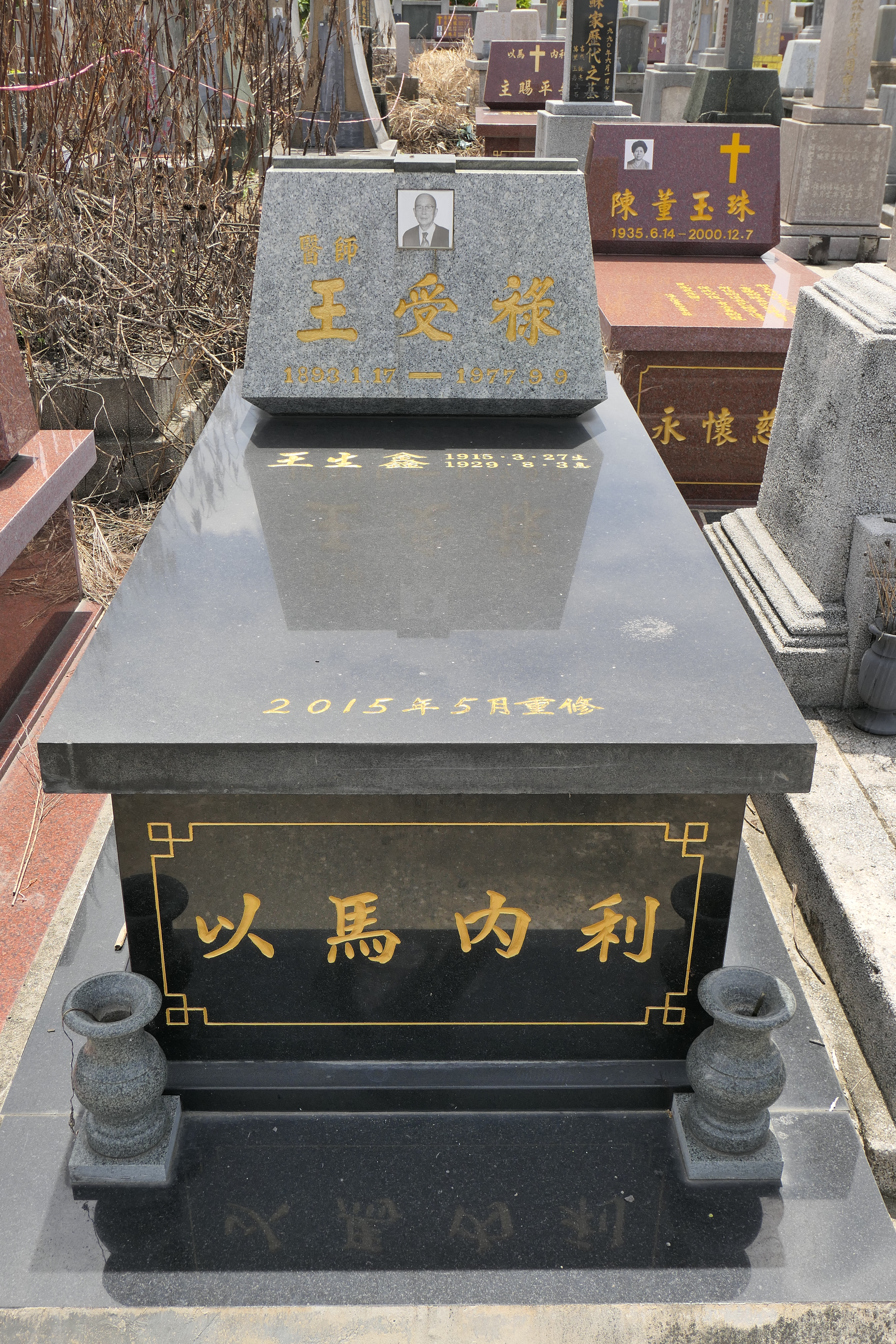 中文（台灣）: 王受祿墓，位在基督教墓地